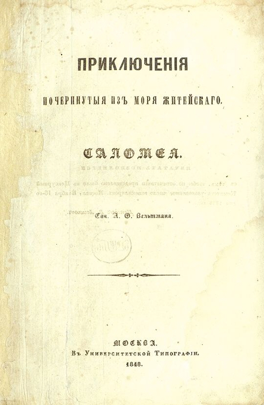 Salomea A. F. Veltmana